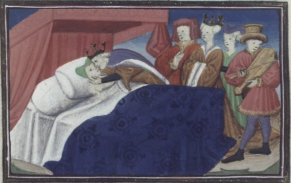 Pierre III d'Aragon et Lisa Puccini